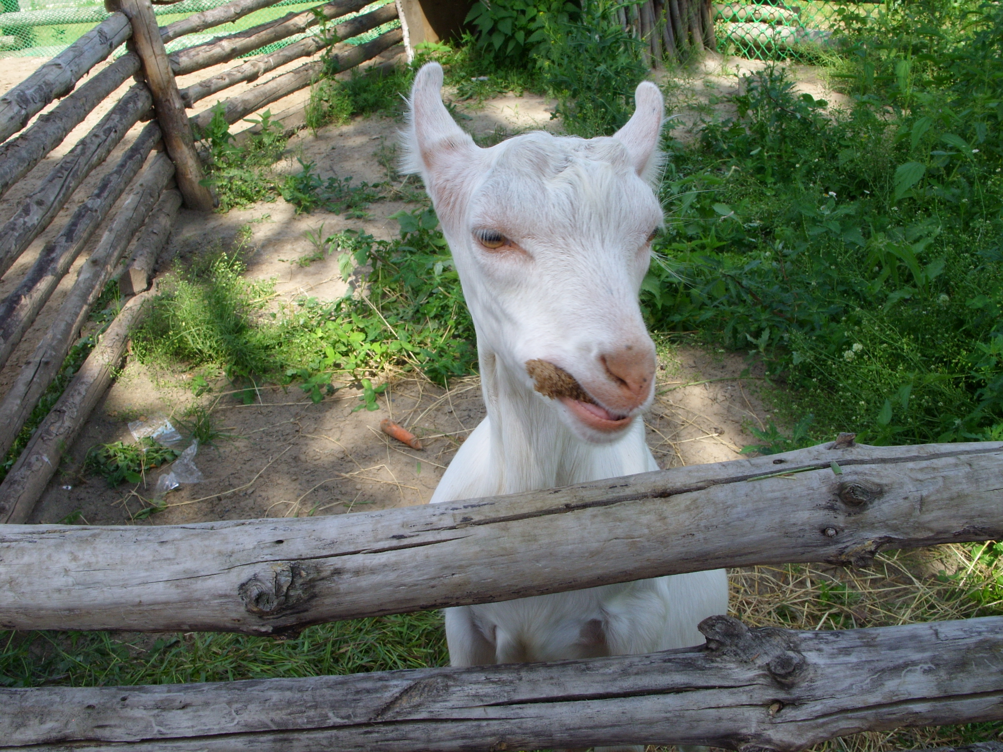 снимки июля 2008 г.